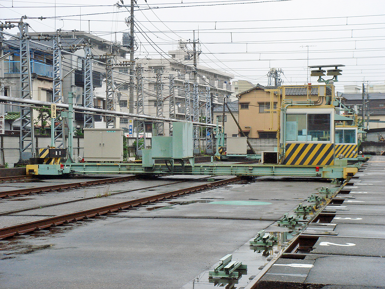 都電荒川車庫内にあるトラバーサー